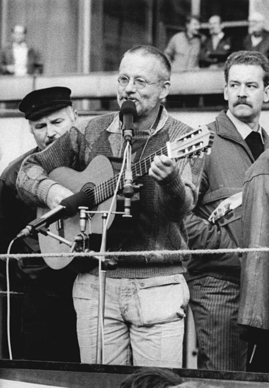 ADN-ZB Link 4.11.89 Berlin: Demonstration 500.000 Bürger beteiligten sich an einer Demonstration für den Inhalt der Artikel 27 und 28 der Verfassung der DDR. Auf dem anschließenden Meeting auf dem Alexanderplatz trat auch Kurt Demmler mit Liedern und Gedichten auf.